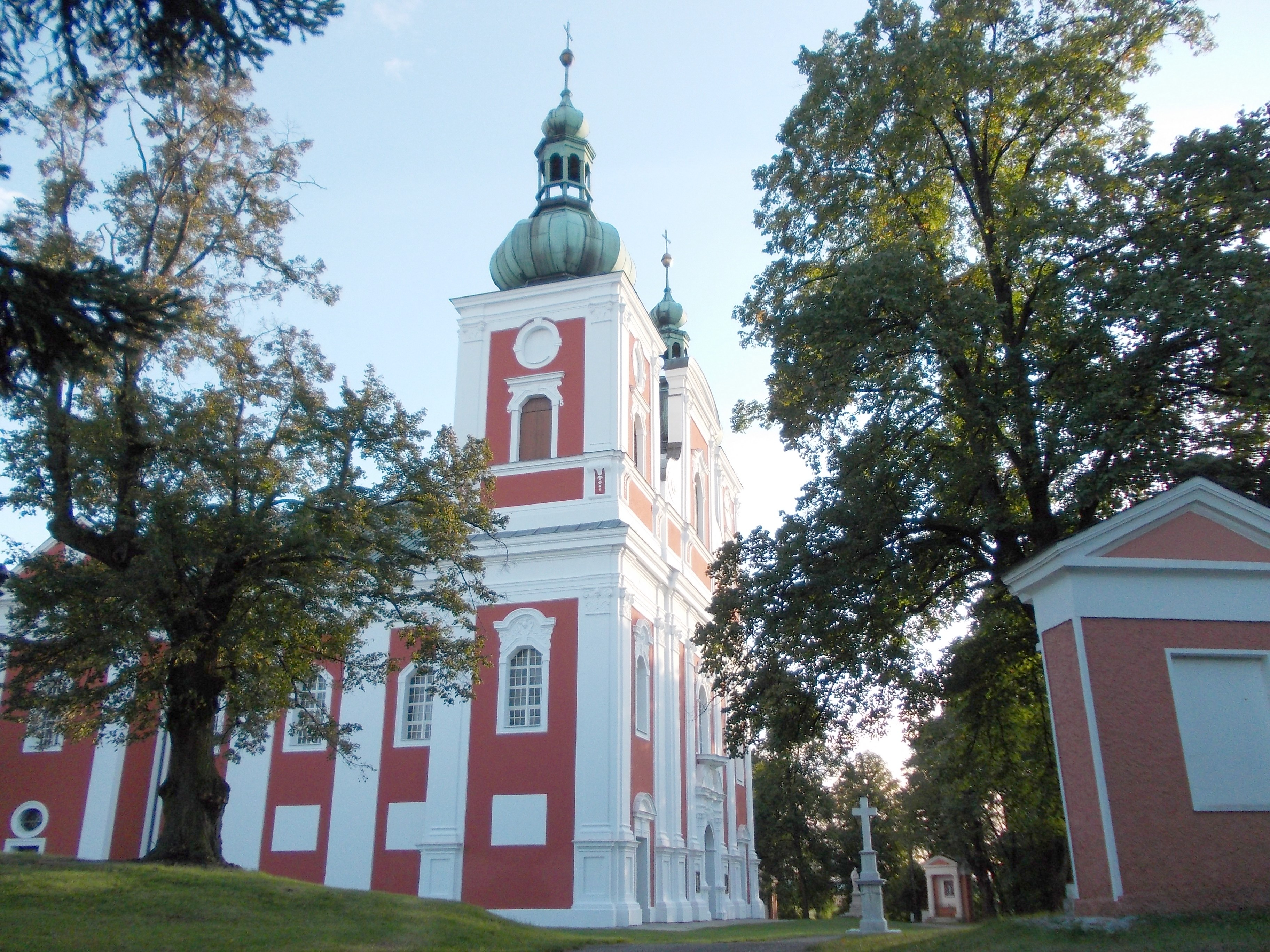 Kostel Panny Marie Sedmibolestné na kopci Cvilíně v Krnově. Pohled z cesty k rozhledně.